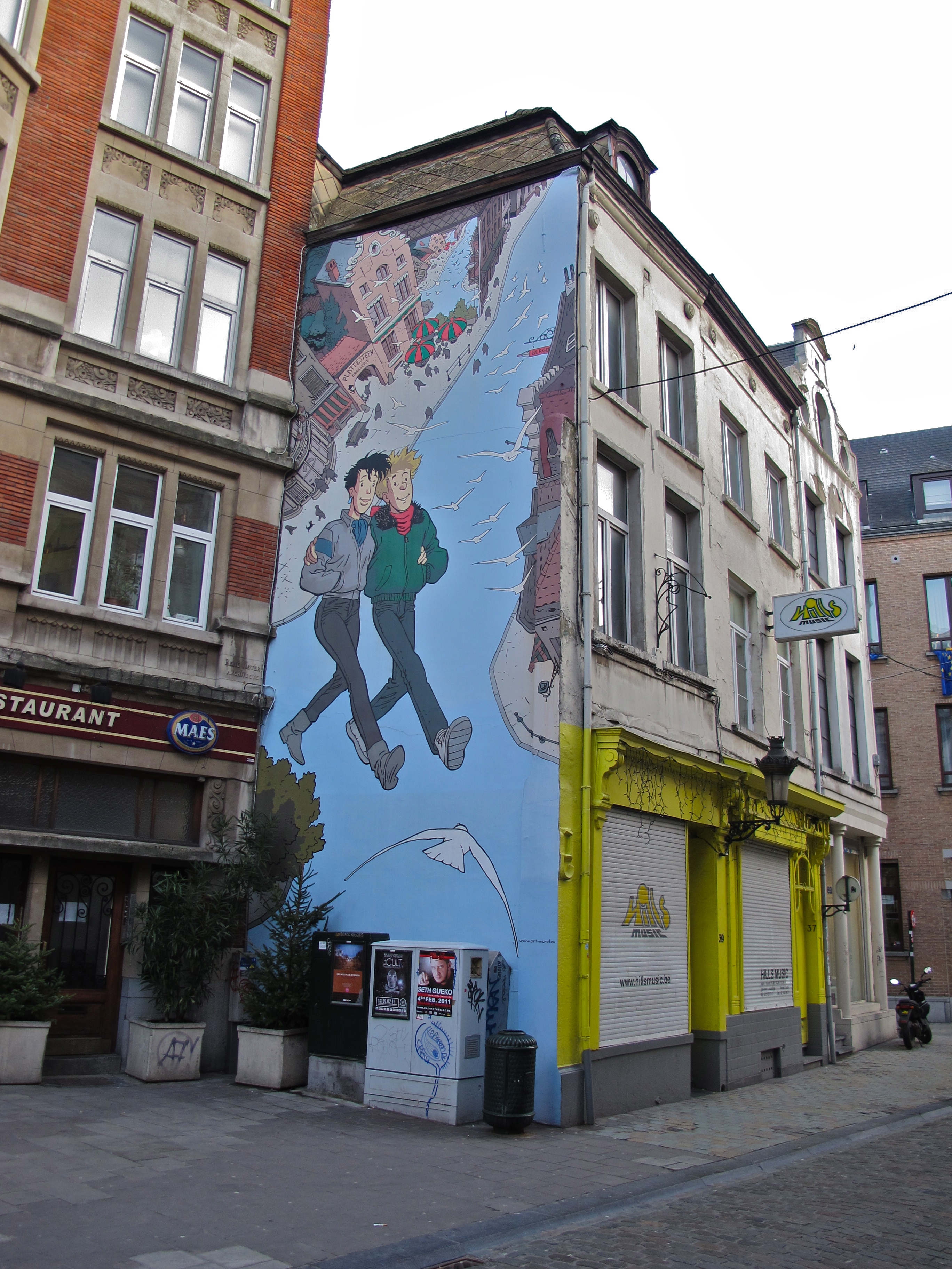 Stripmuur Ragebol te Brussel